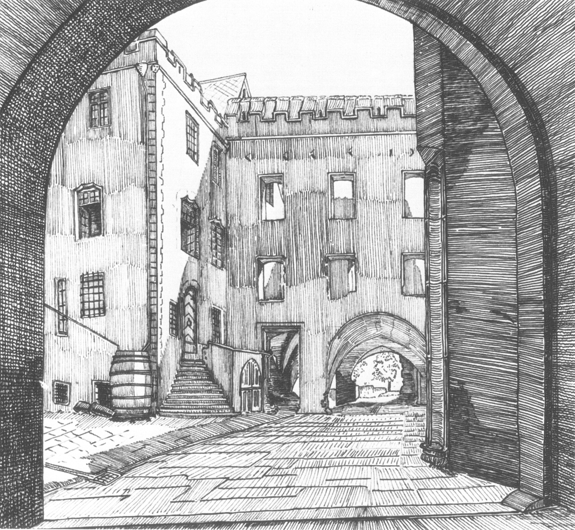 Der innere Schloßhof des Altstädter Schlosses. Kopie von H. Birkner nach dem Skizzenbuch von J. E. Ruhl. Stadtschloss Hanau, Blick nach Süden in Richtung Tor. Rechts neben dem Tordurchgang eine Ecke des Bergfrieds. Die Gebäude mit den zinnenartigen Bekrönungen im Hintergrund sind schon demoliert. Entstanden während dem Abbruch 1829.